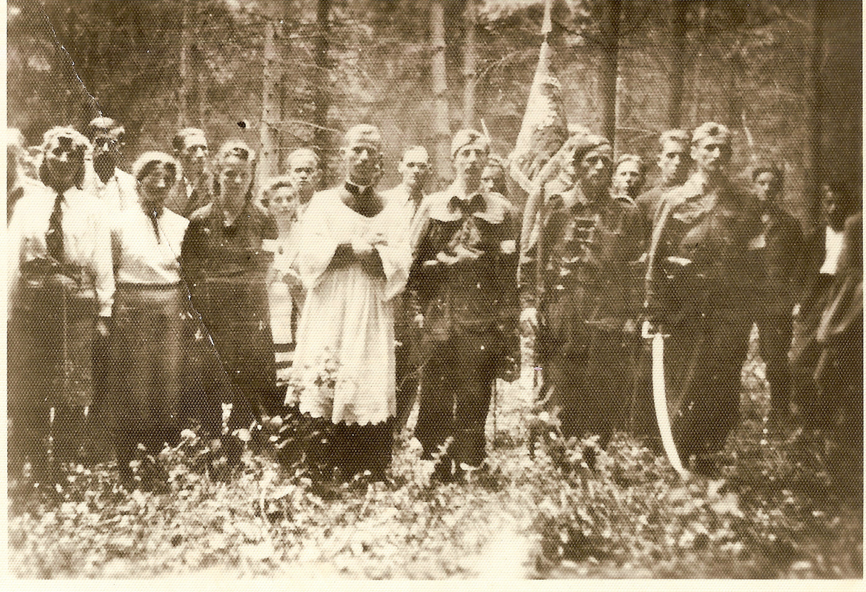 Żołnierze Oddziału Leśnego "Lech". Poświęcenie sztandaru